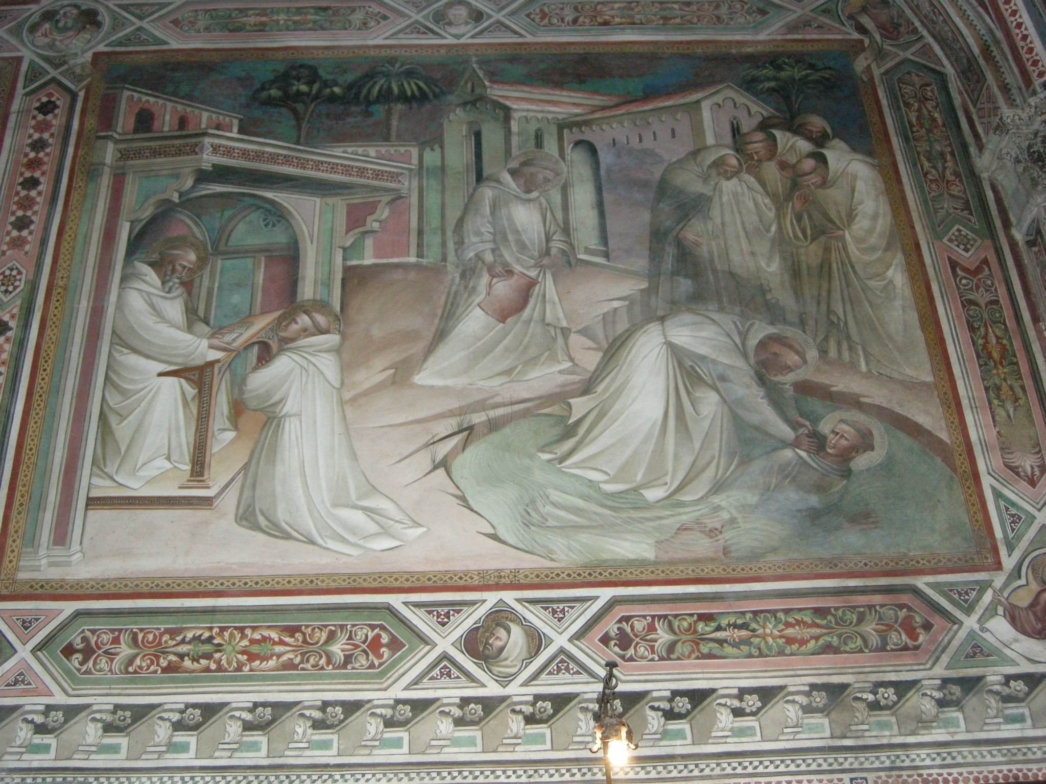 Spinello aretino, storie di san benedetto, episodio 12, Mauro, inviato da Benedetto, salva Placido camminando sulle acque